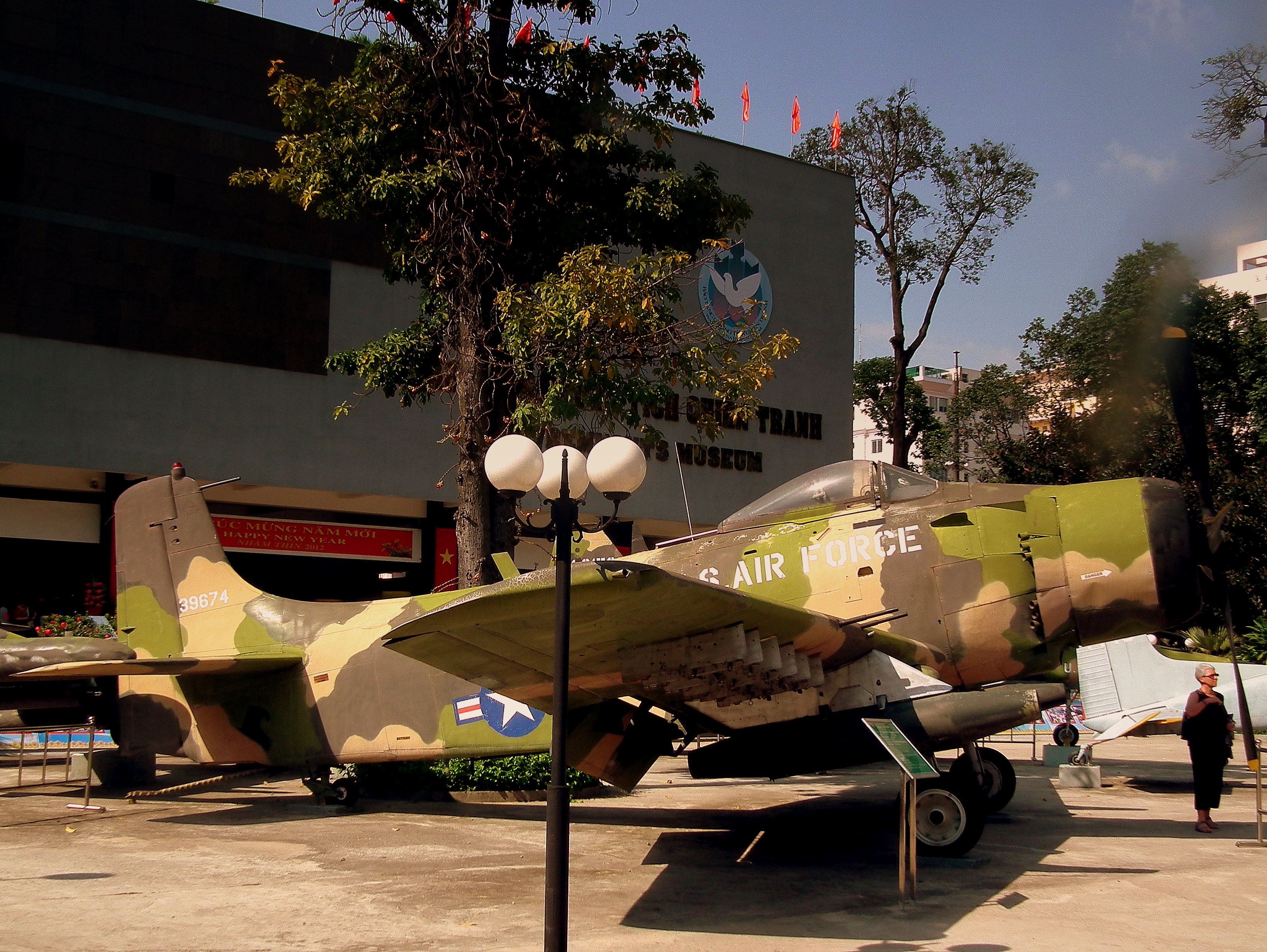 DOUGLAS SKYRAIDER WAR REMNANTS MUSEUM SAIGON/HO CHI MINH CITY VIETNAM JAN 2012